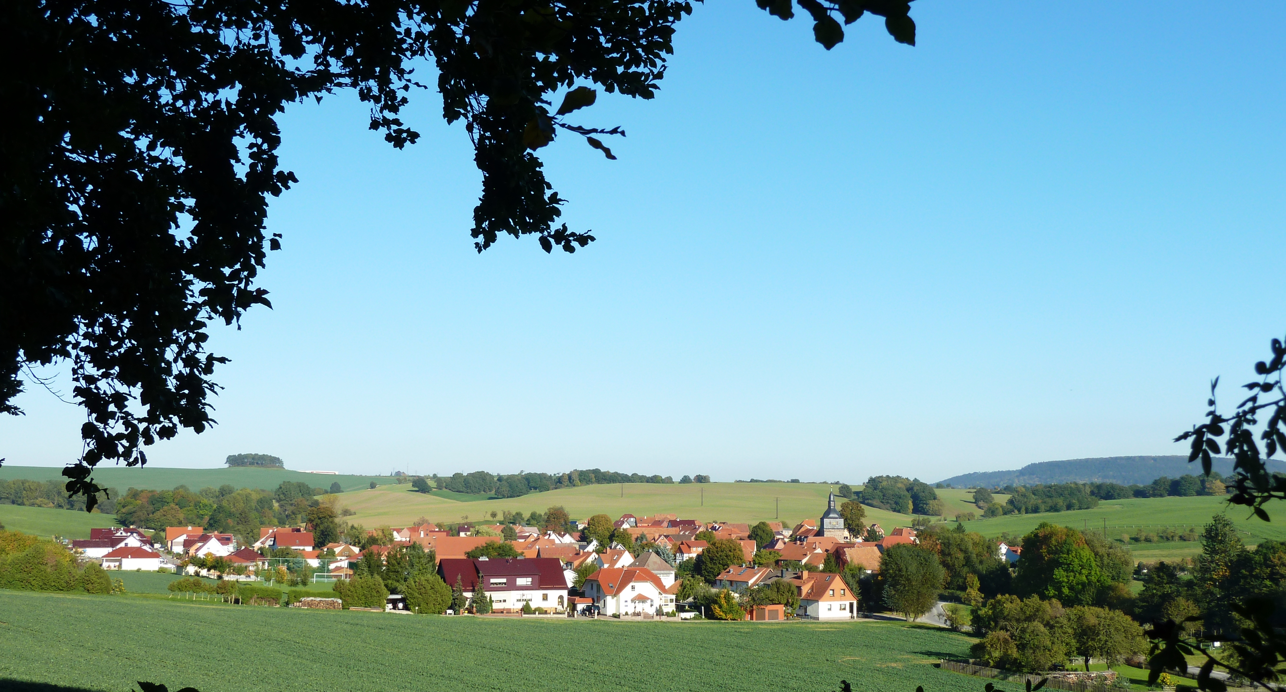 Blick von Südwesten auf Rengelrode (im Hintergrund rechts der Dün bei Heiligenstadt)